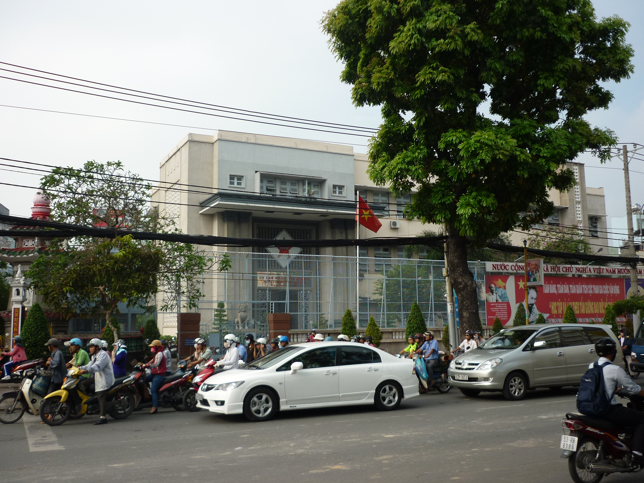 Trụ sở UBND quận 3 trước giải phóng là tòa đại sứ Cam-bốt